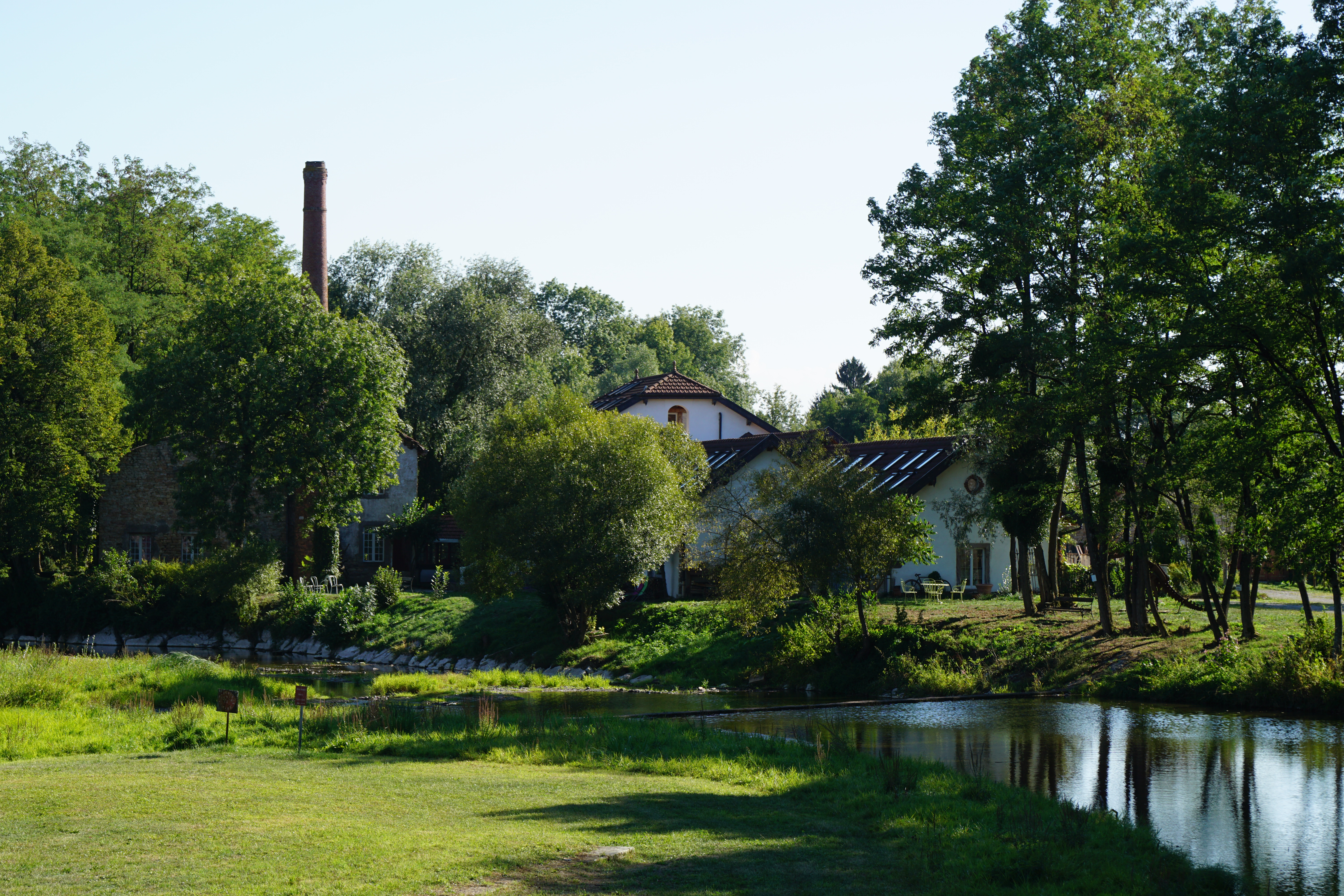 Une ancienne usine de Vouhenans 70.